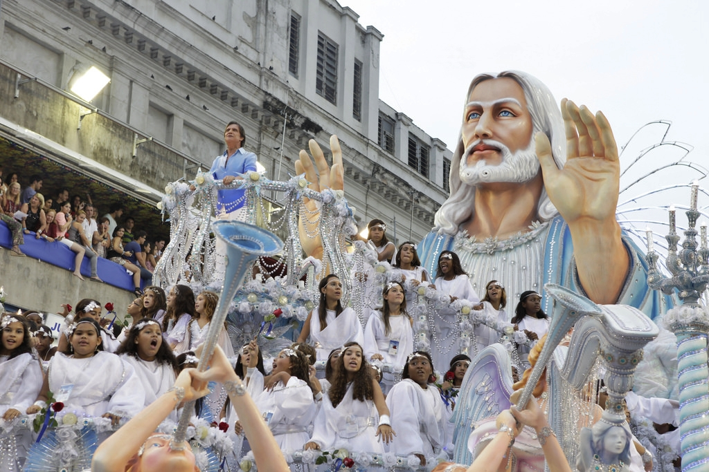 Rio de Janeiro - Escolas de samba se apresentam no Sambódromo da Marquês de Sapucaí. (Raphael David/Agência Brasil)